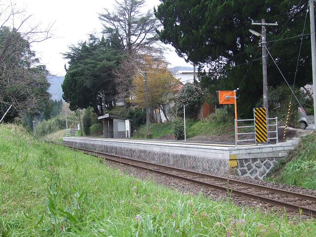 JR吉都線 鶴丸駅の写真